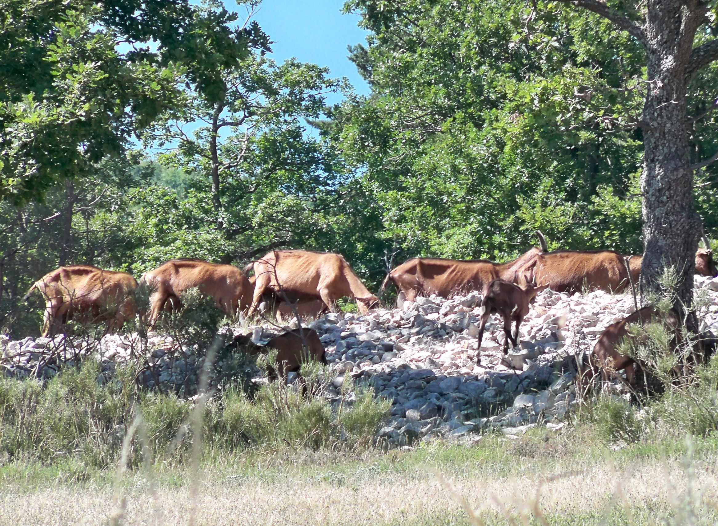 chèvres dans le hameau d'Anglars, à l'Hospitaler